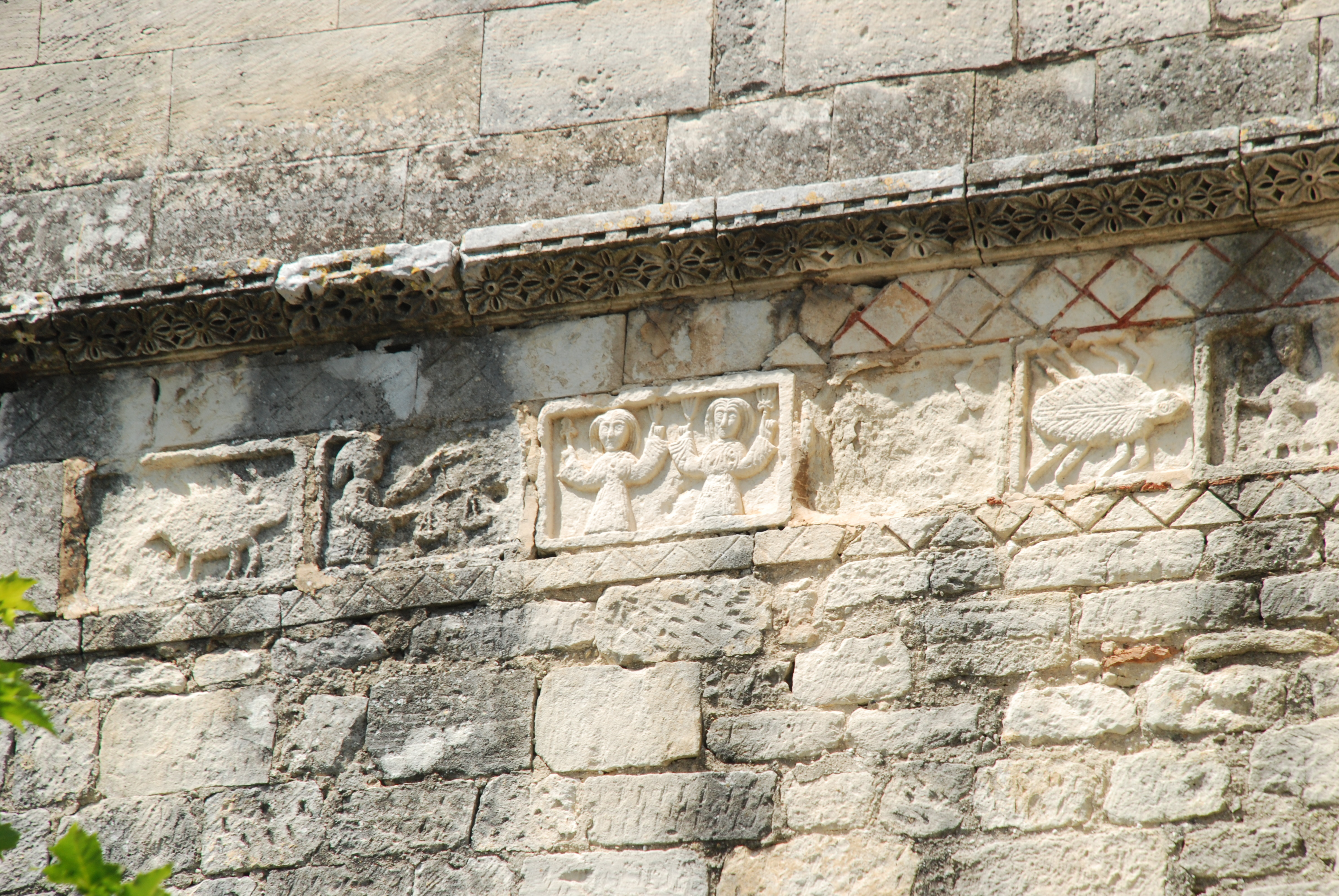 France - Drôme - Tour funéraire de Saint-Restitut - Frise romane